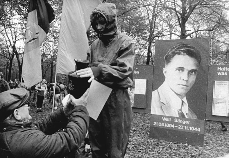 Ellen Kießling ADN-ZB Grimm 13.11.88 Berlin: Sieg an Ellen Kießling- Den III. Wertungslauf der Cross-Serie des DVfL über 2 km gewann im Plänterwald die Dresdnerin Ellen Kießling (SC Einhait). Der Wettbewerb fand im Rahmen des 33. Willi-Sänger-Gedenklaufes statt.